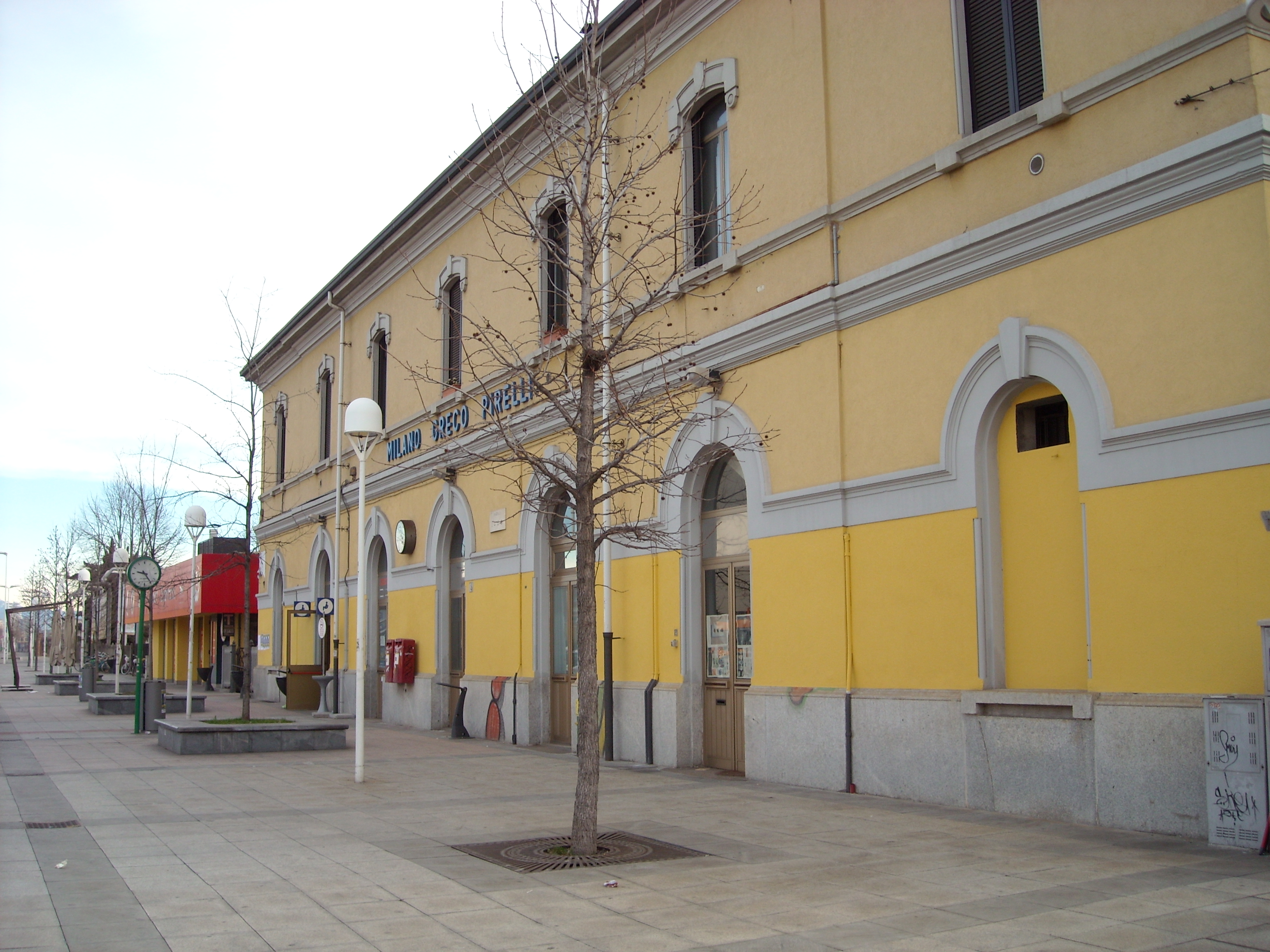 Stazione ferroviaria di Milano Greco Pirelli